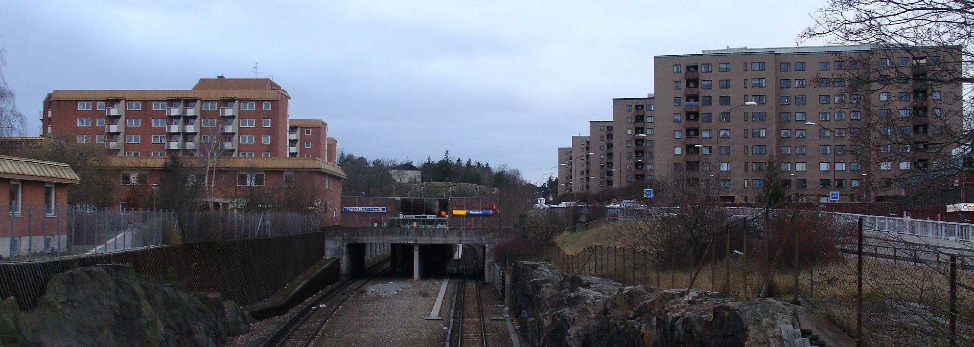 Axelsbergs tunnelbanestation samt höghus